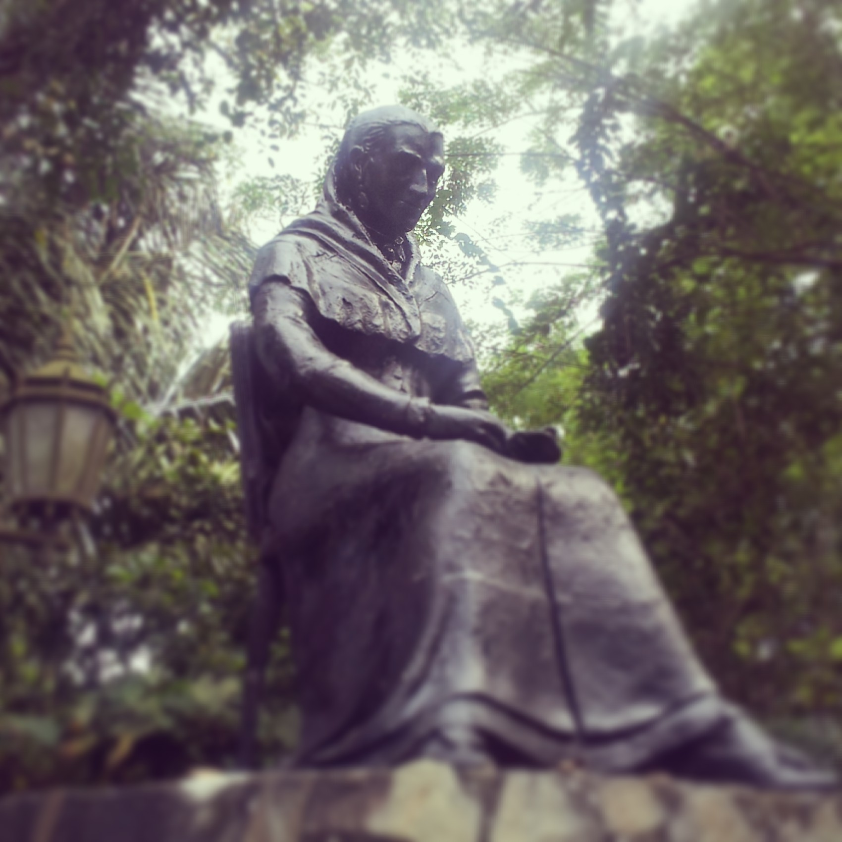 Estatua de Amelia Denis De Icaza ubicada en el mirador de la cima del Cerro Ancón en Ciudad de Panama.